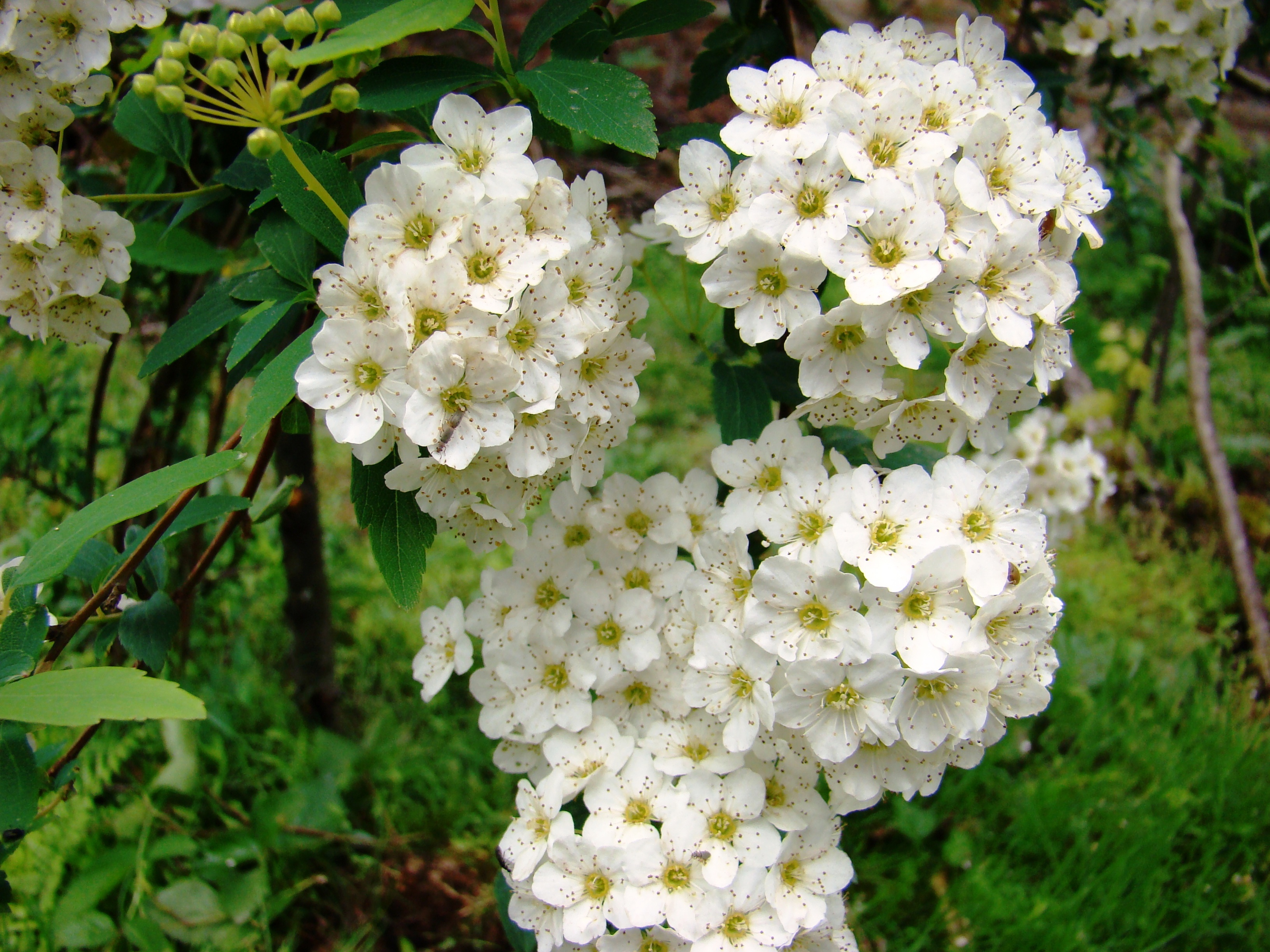 Melez ispir (Spiraea × vanhouttei)